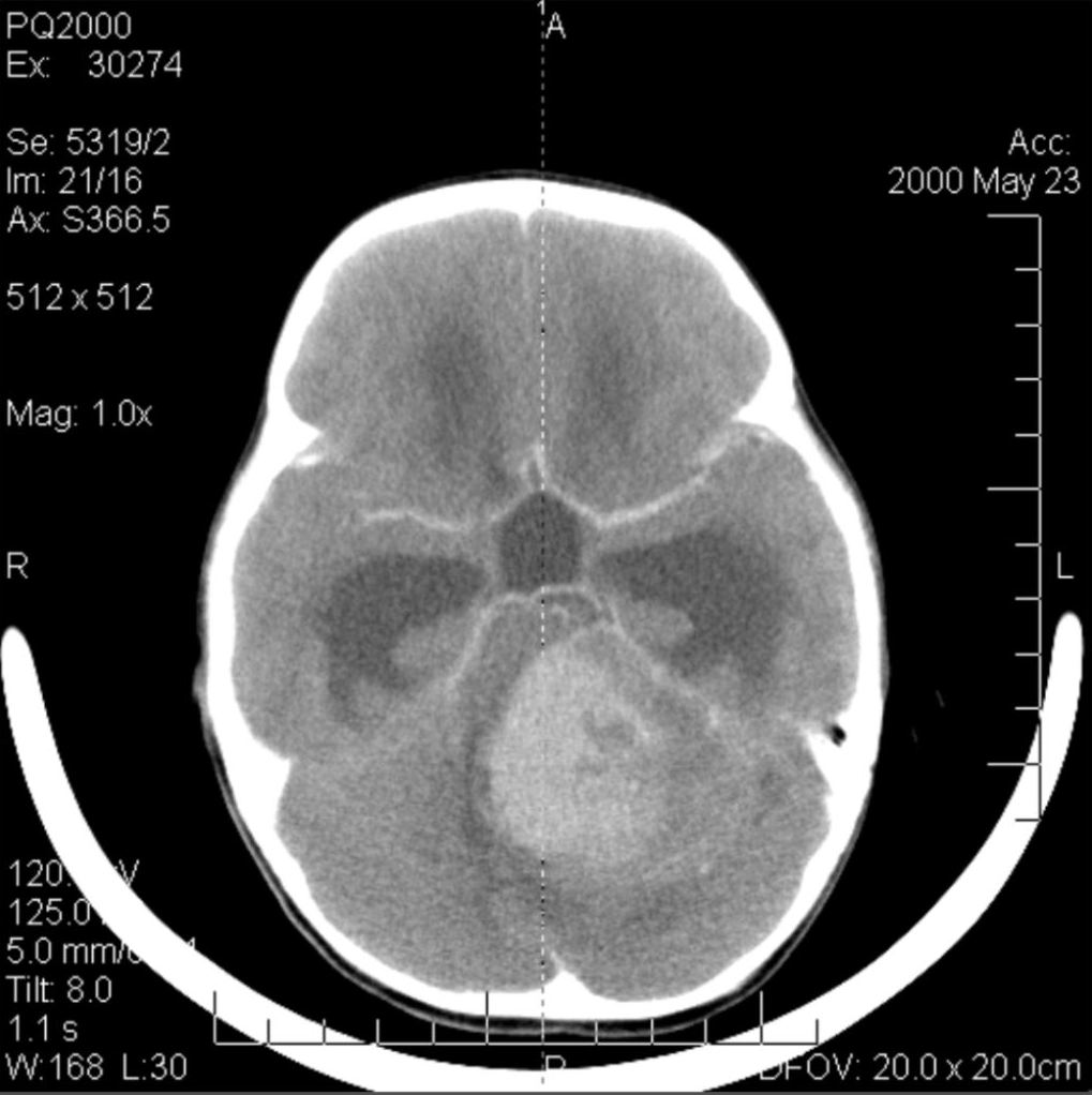 medulloblastoma